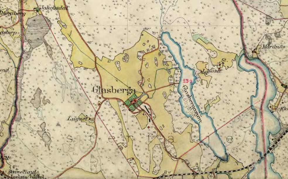 Del av Häradsekonomiska kartan visande Glasberga gård